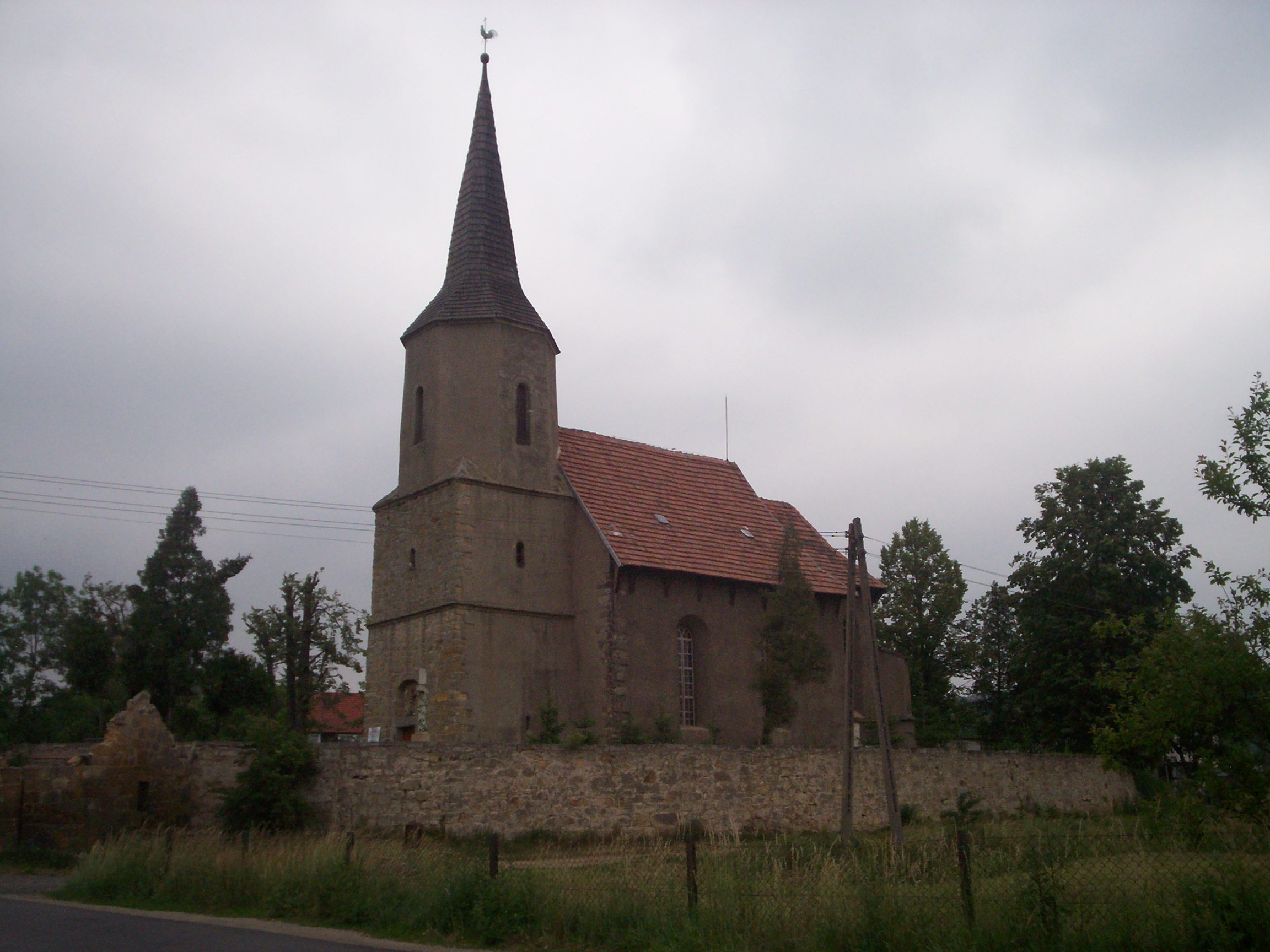 Polska. Powiat Lwówek Śląski, wieś Żerkowice, kościół.